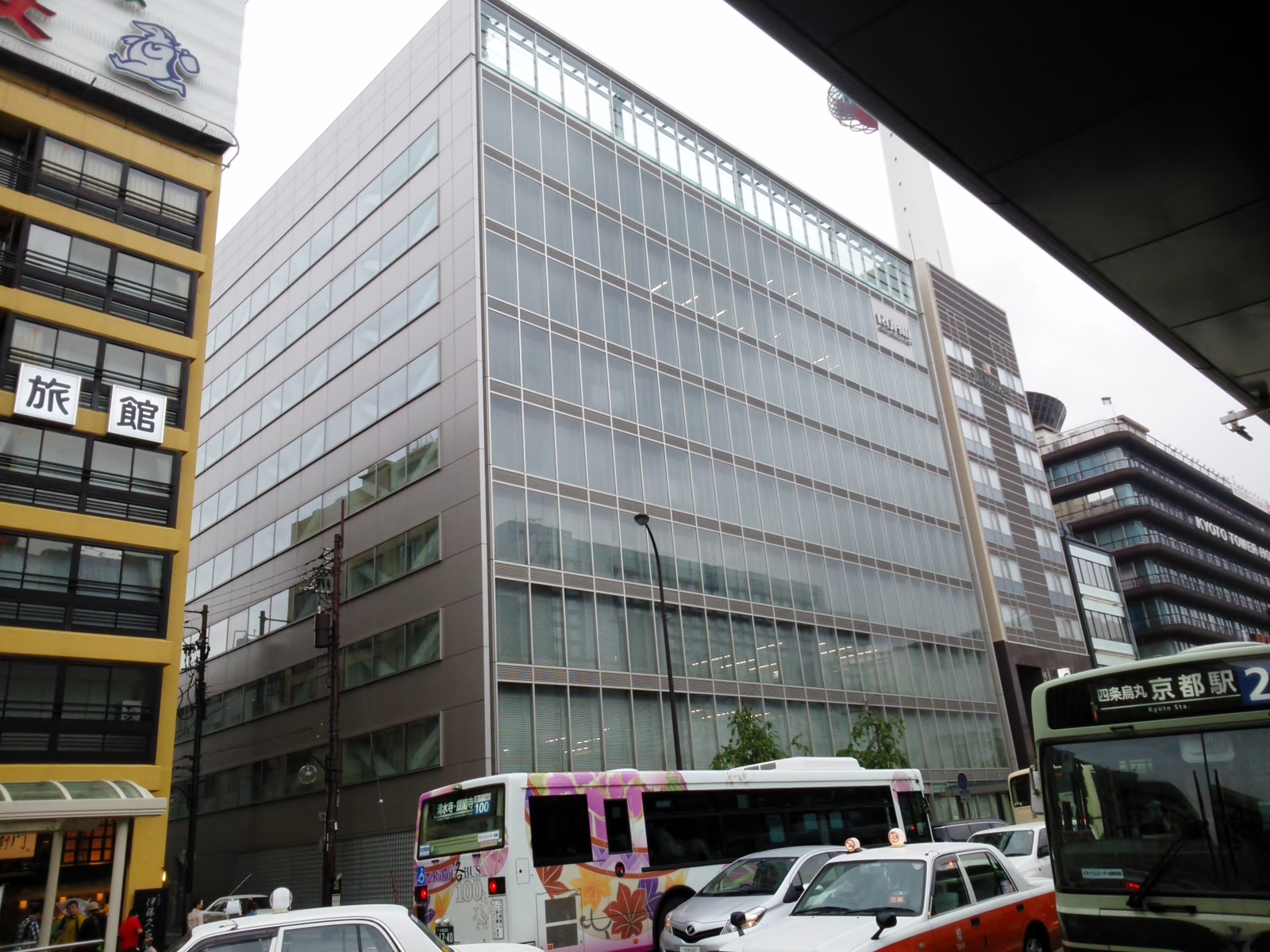 ローム京都駅前ビルを撮影。